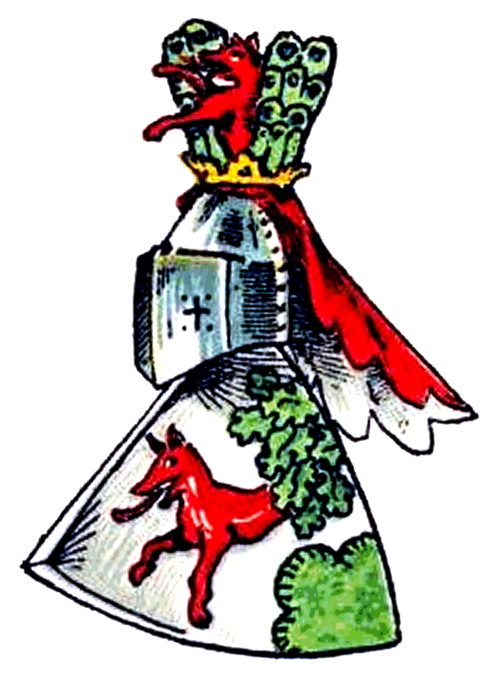 Wappen derer von Wartensleben